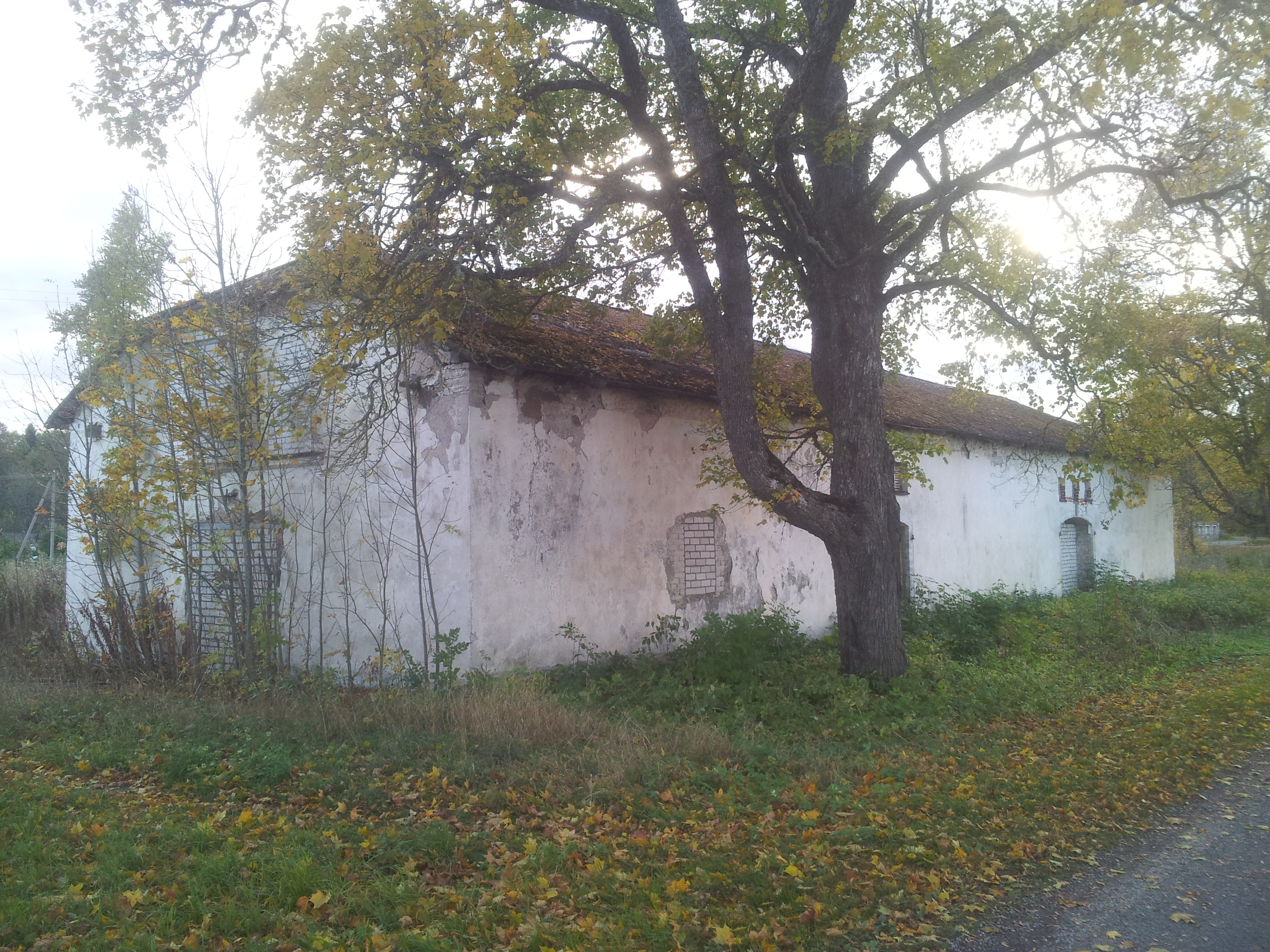 Aaspere mõisa tõllakuur